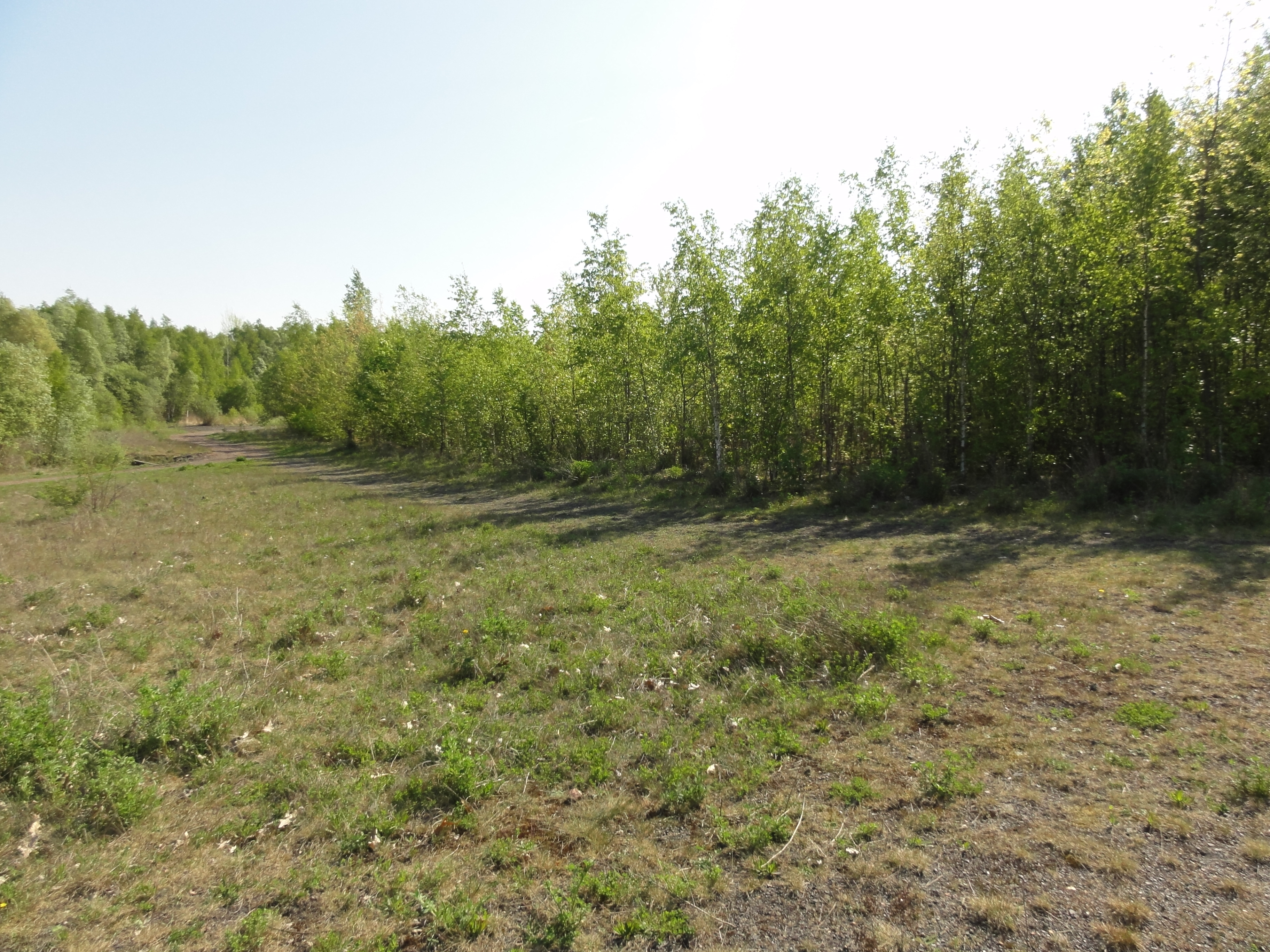 Terril n° 256 dit Cavalier triangle Barrois, Fosse Barrois, Pecquencourt, Nord, Nord-Pas-de-Calais, France.